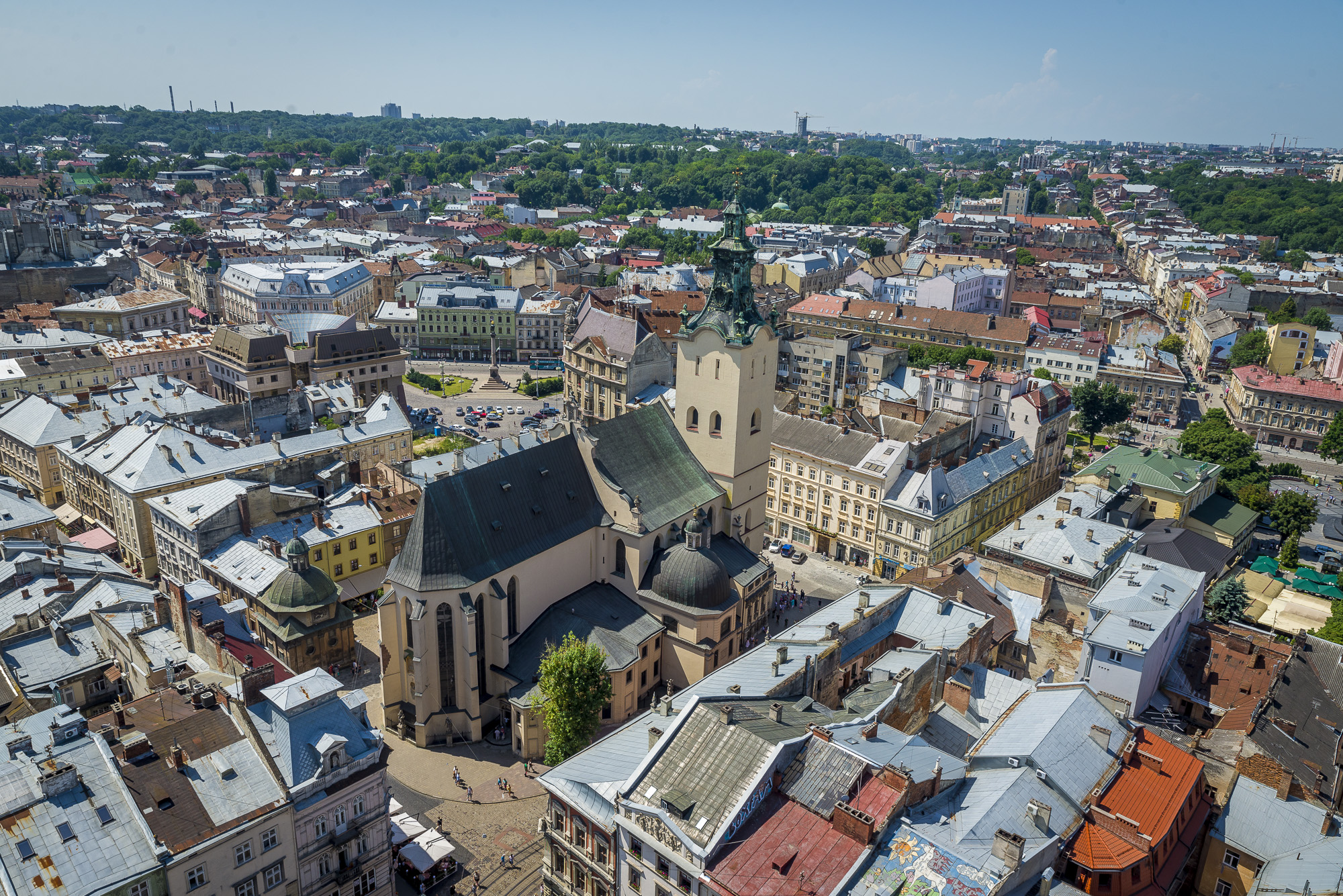 собор Кафедральний, Львів, Катедральна пл., 1